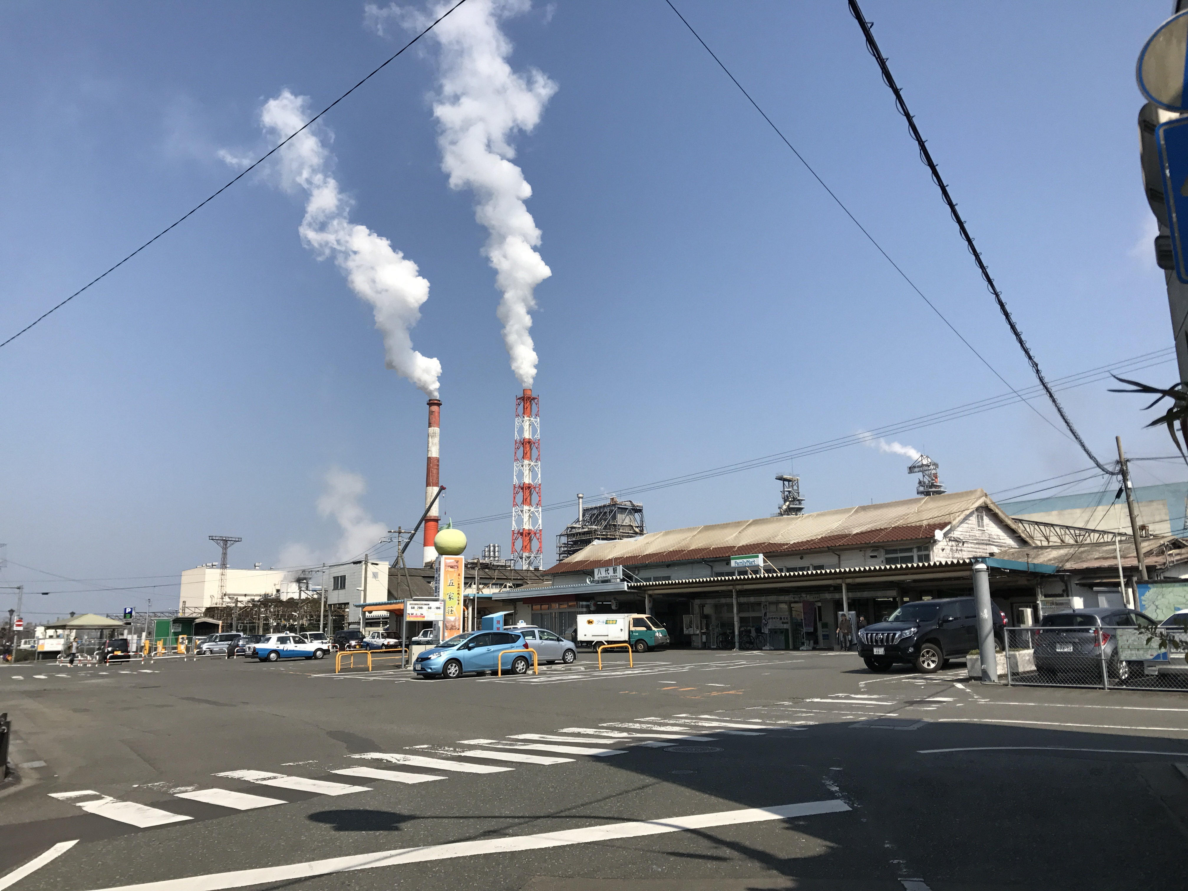 八代駅の遠景